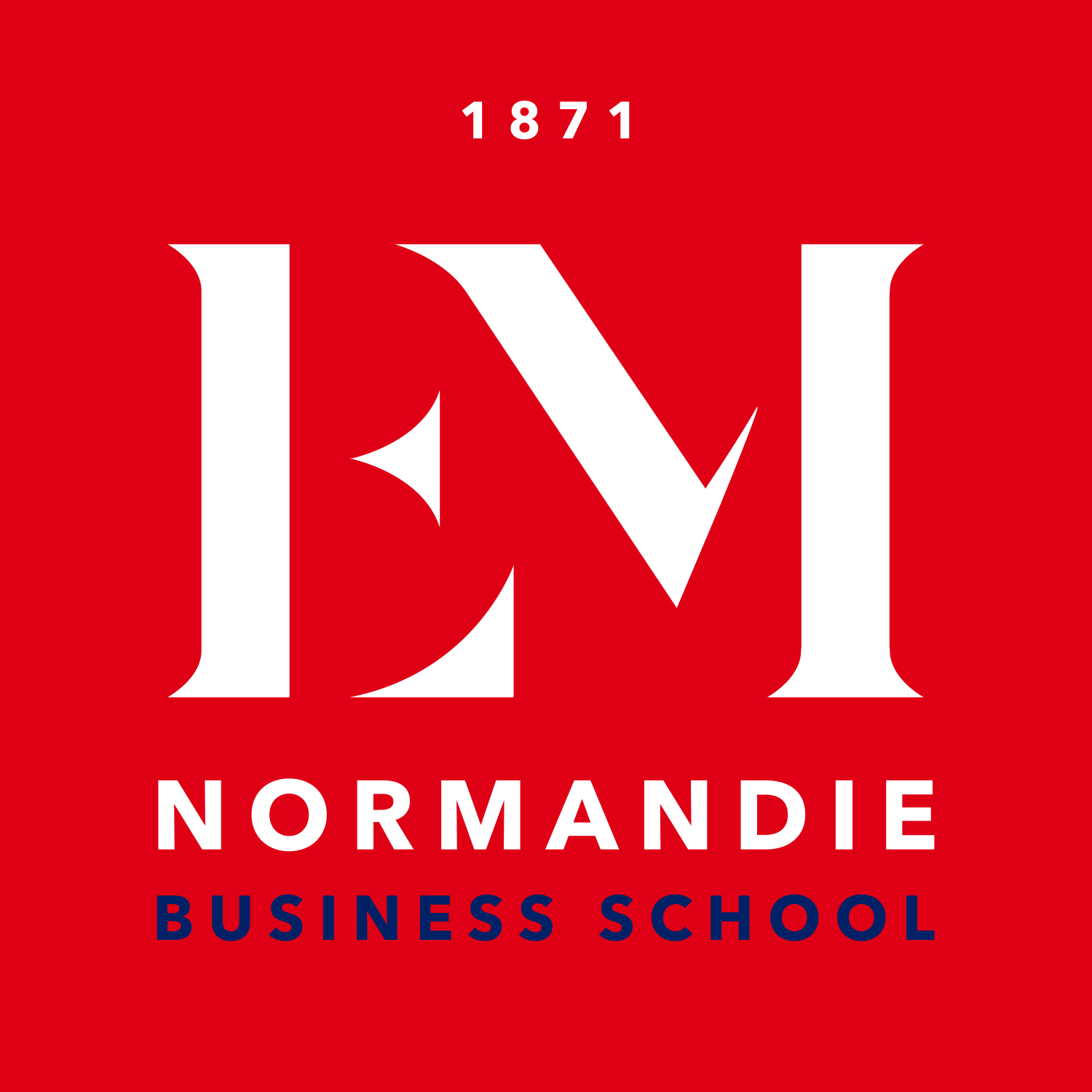 Logo de l'EM Normandie